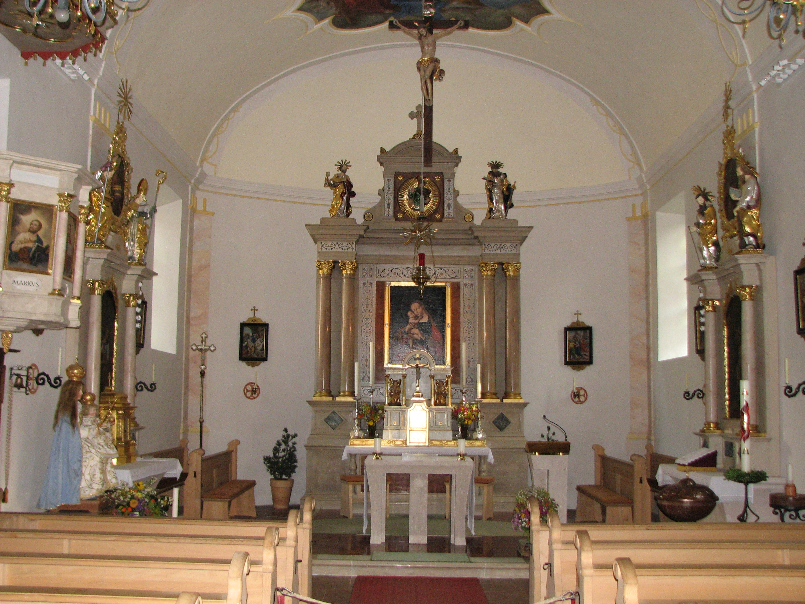 Kath. Pfarrkirche hl. Petrus und Paulus